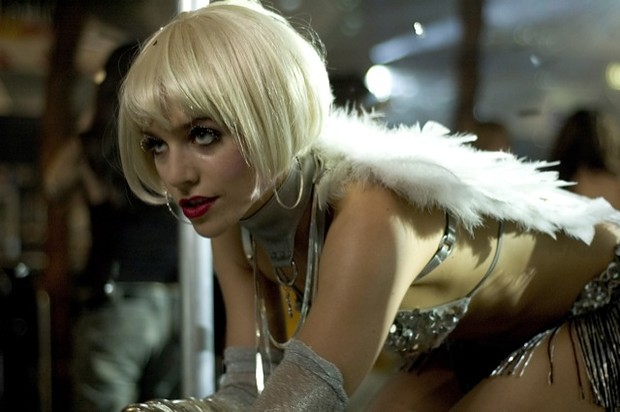 Pressefoto "Little Paris"